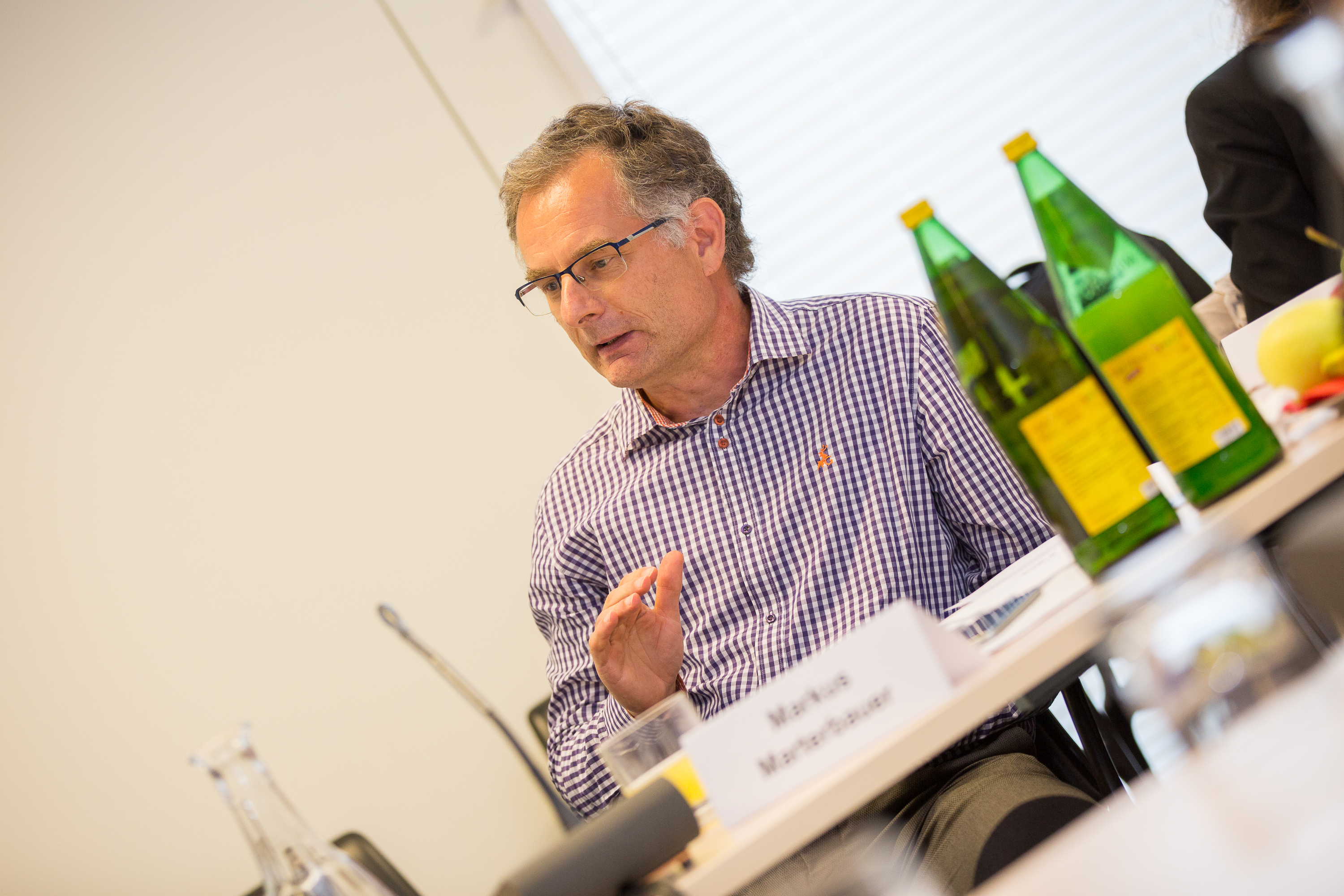 ExpertInnen Austausch anlässlich der Kurt Rothschild Preisverleihung, 27.09.2017